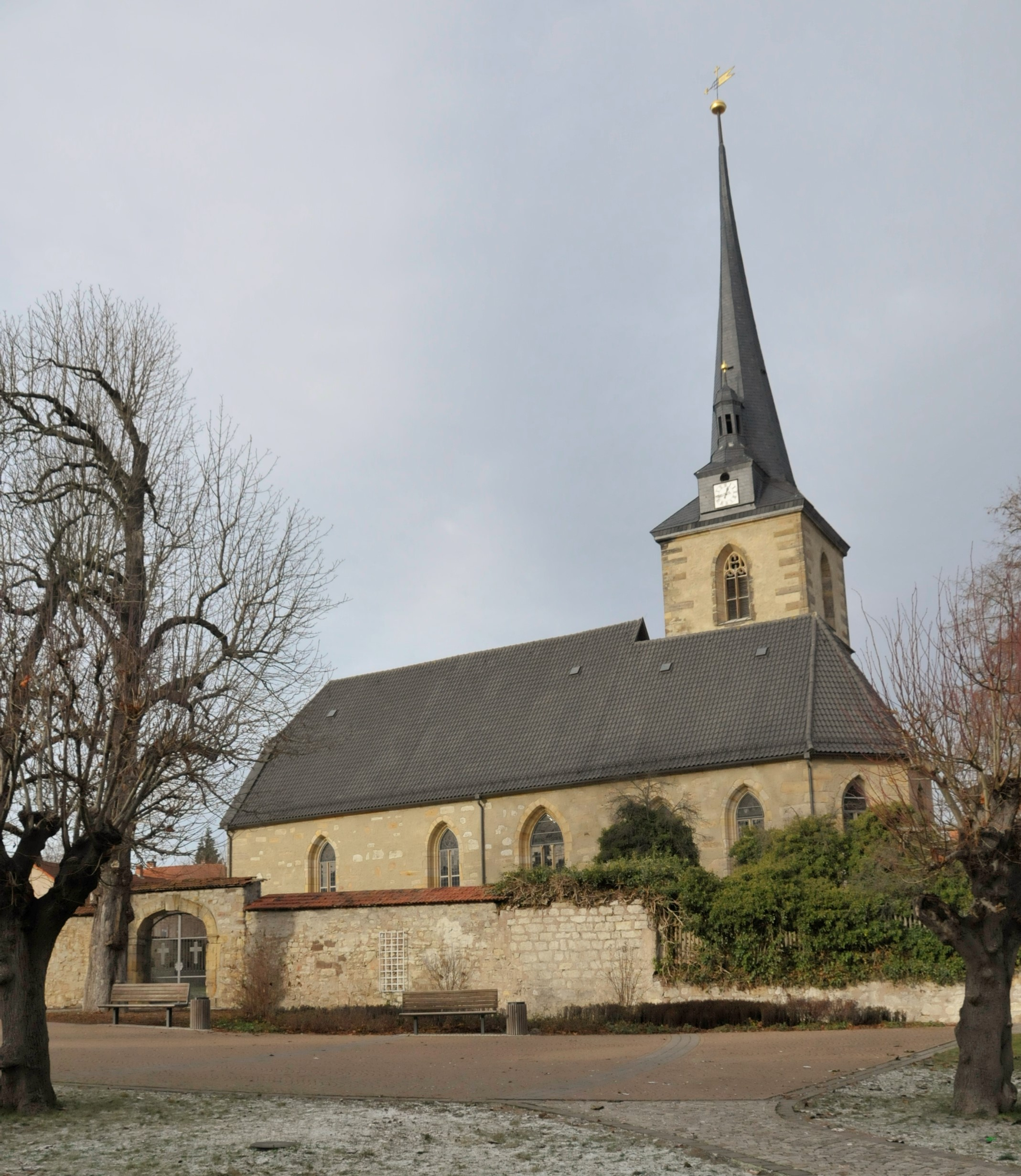 Goldbach, Dorfkirche St. Peter